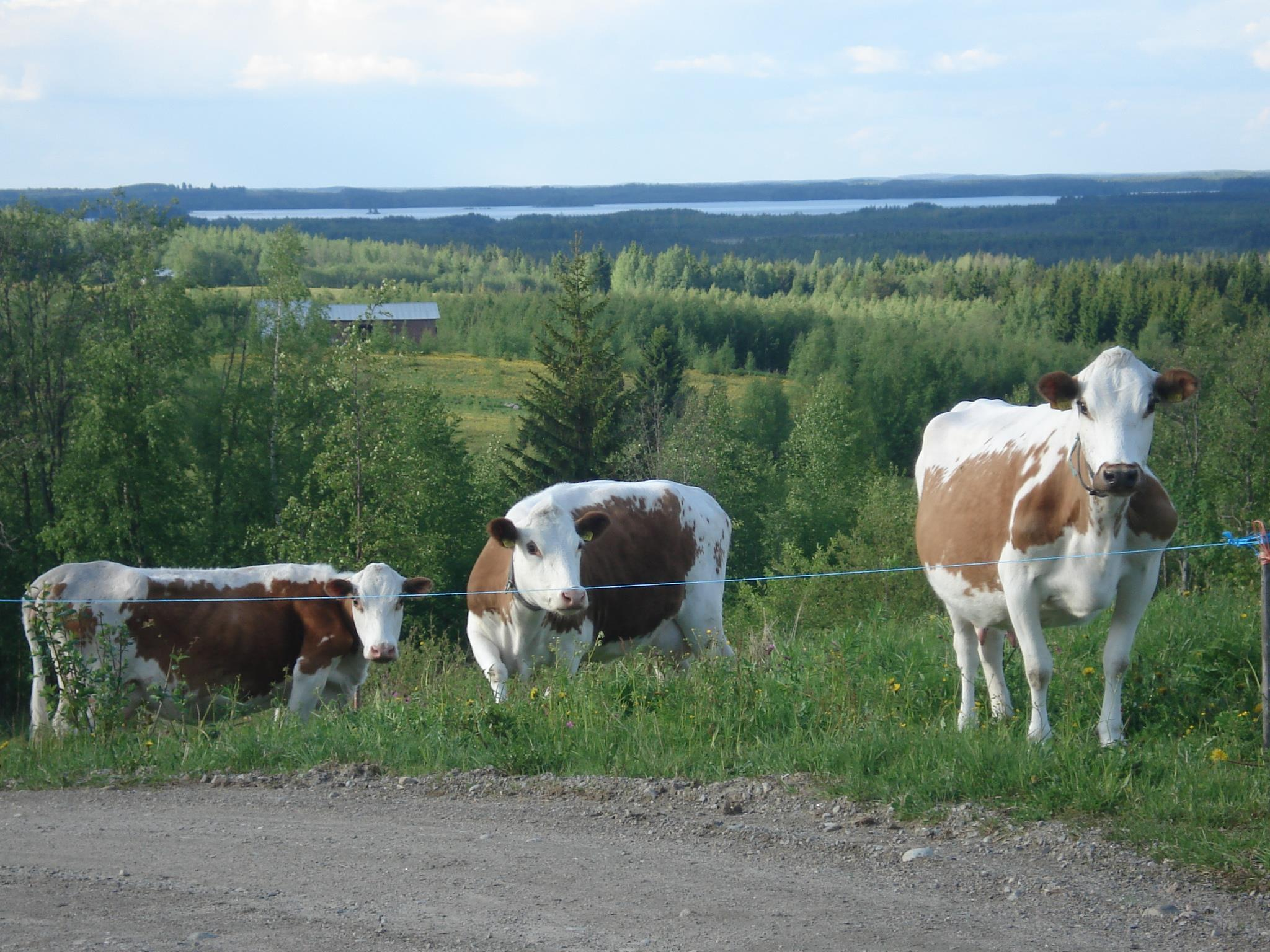 Itä-Suomen karjaa eli kyyttölehmiä.